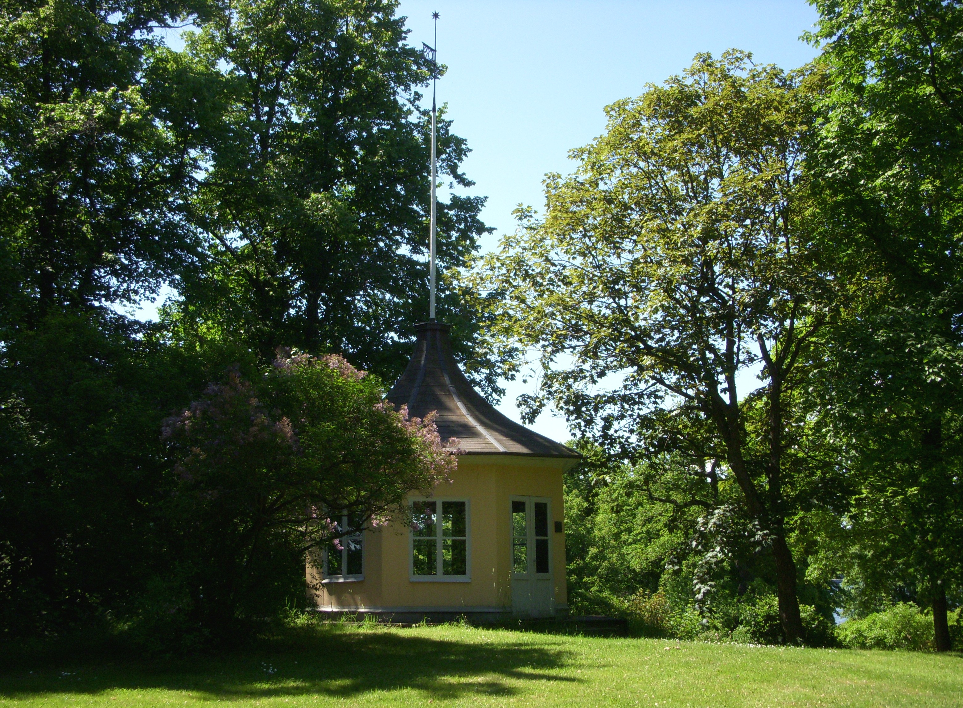 Lusthuset från 1700-talet på Nedere Manilla